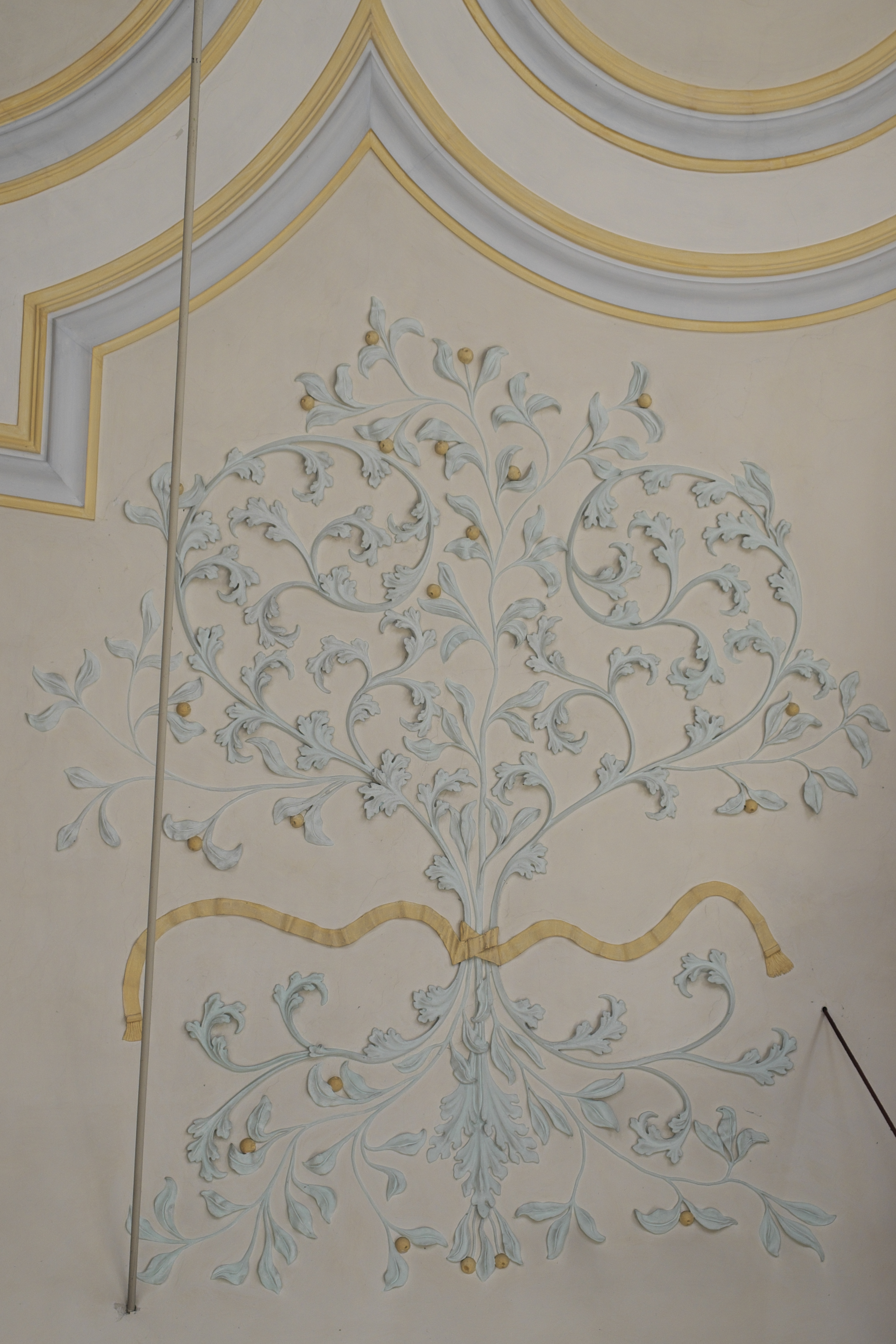 Katholische Pfarrkirche St. Martin in Penzing im Landkreis Landsberg am Lech (Bayern/Deutschland), Stuck von Georg Dötl, von 1719 (zum Teil erneuert)